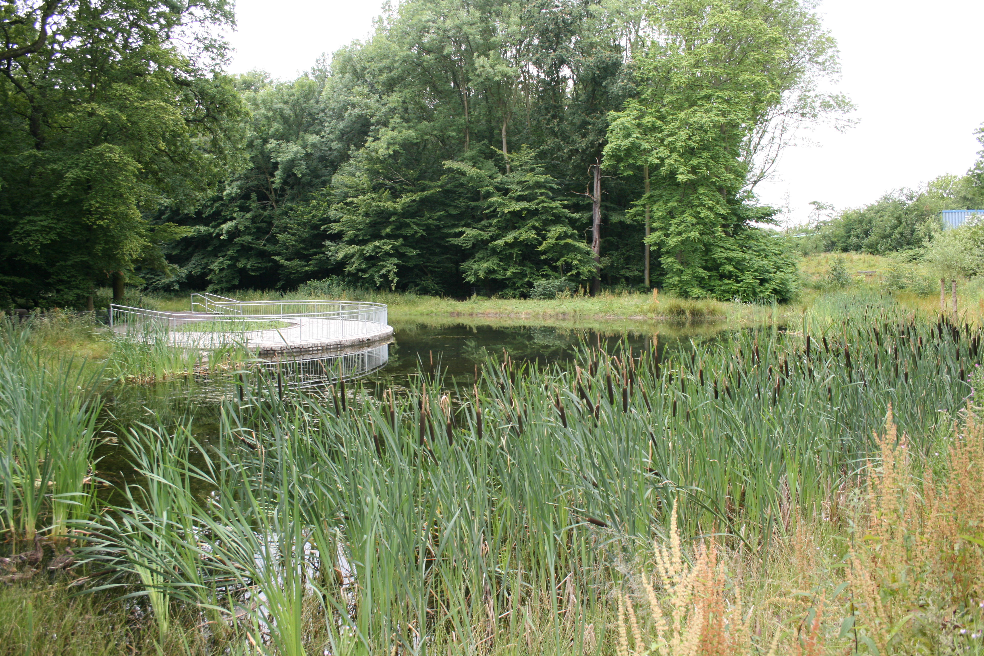 See im Hoeschpark Dortmund